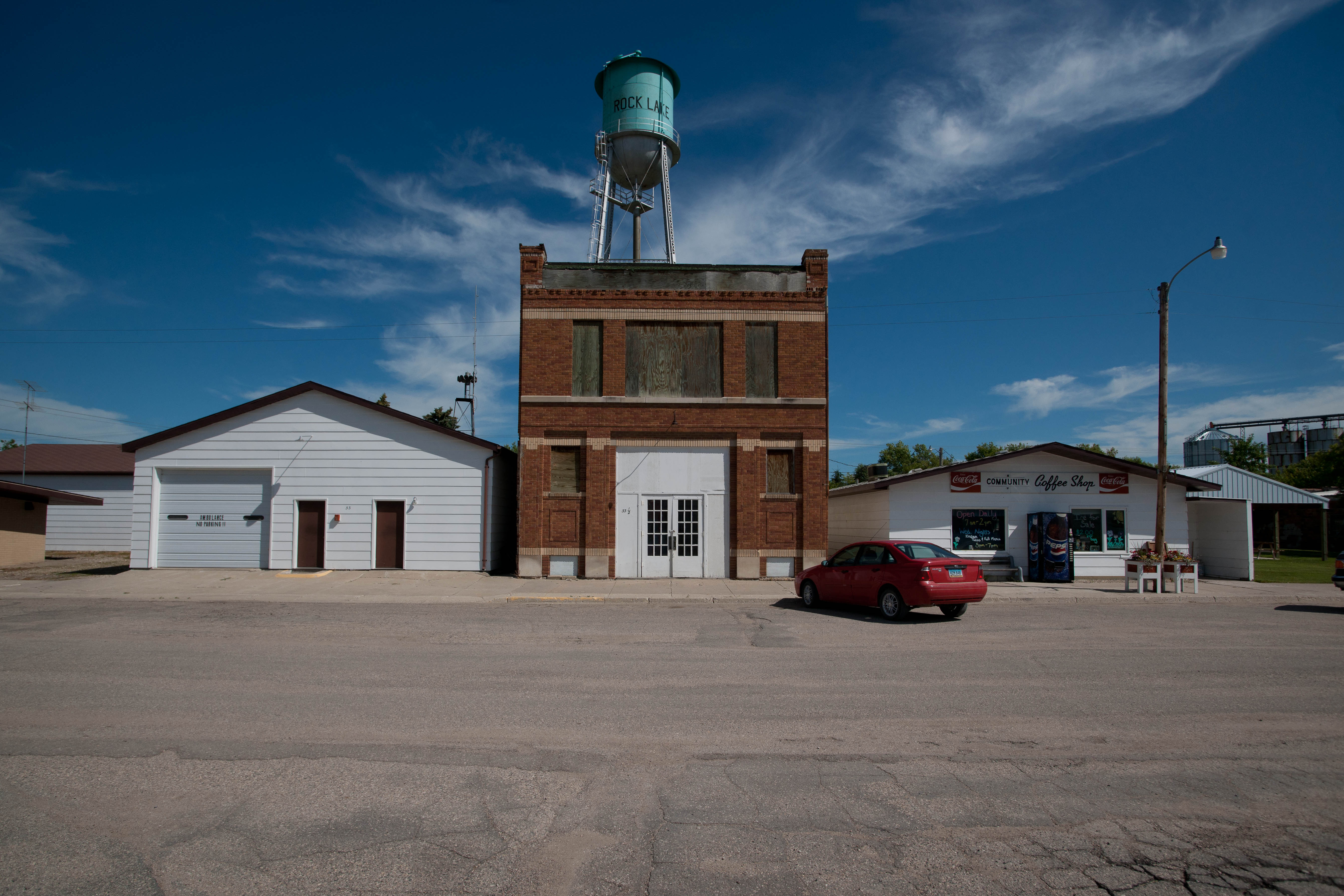 Rocklake, North Dakota